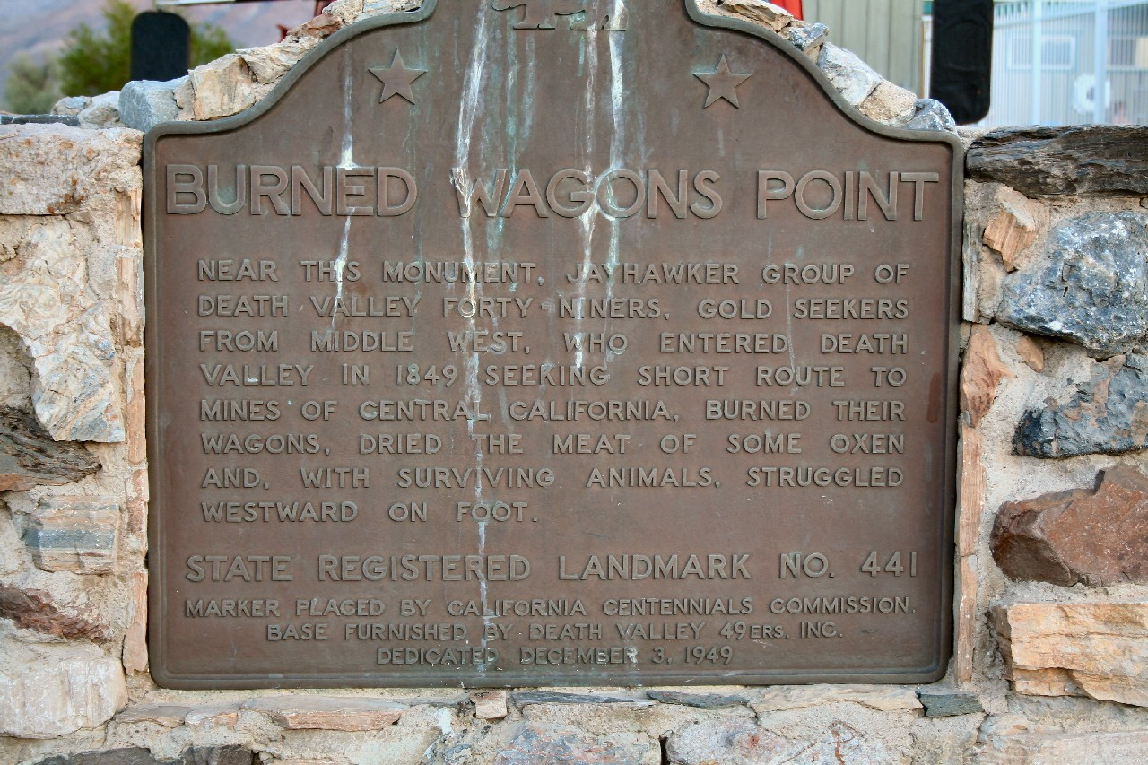 commemorative plaque at Stovepipe Wells